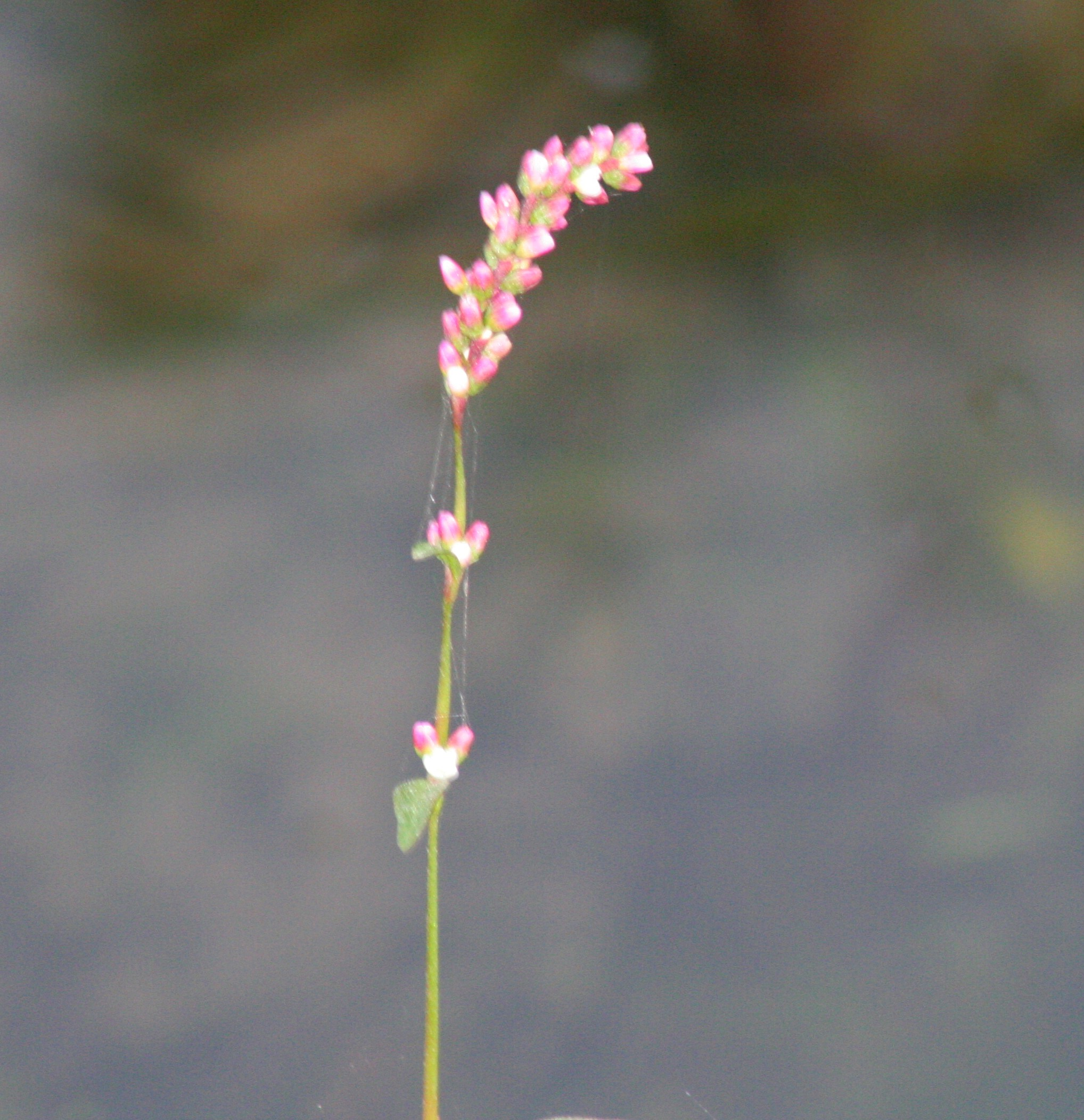 Persicaria_minor (Polygonum minus) - Poligono minore Località Canizzano (TV), quota 10 m s.l.m.